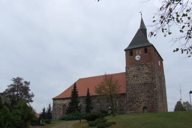 Dorfkirche Linthe, Gemeinde Linthe, Potsdam Mittelmark Fotograf: Harald Rossa Datum: November 2006 Höher aufgelöste Version ist verfügbar